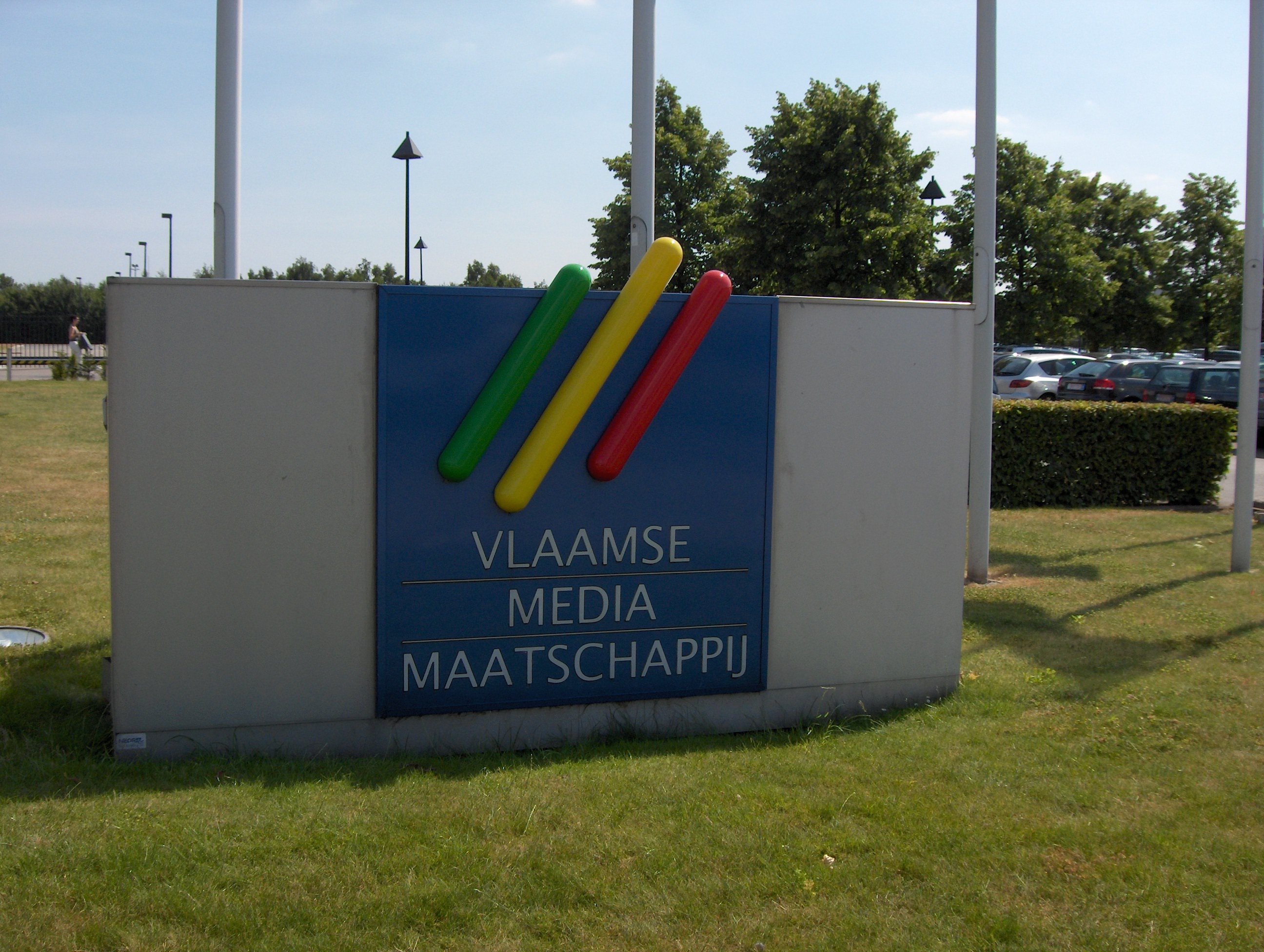 Logo off the "Vlaamse Media Maatschappij" at their buildings